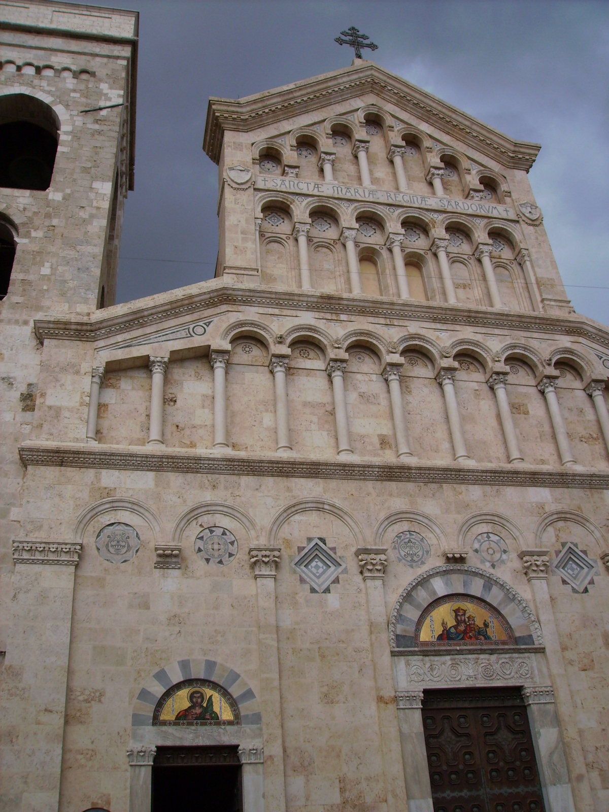 Kathedrale_Santa_Maria, Cagliari, Sardinien